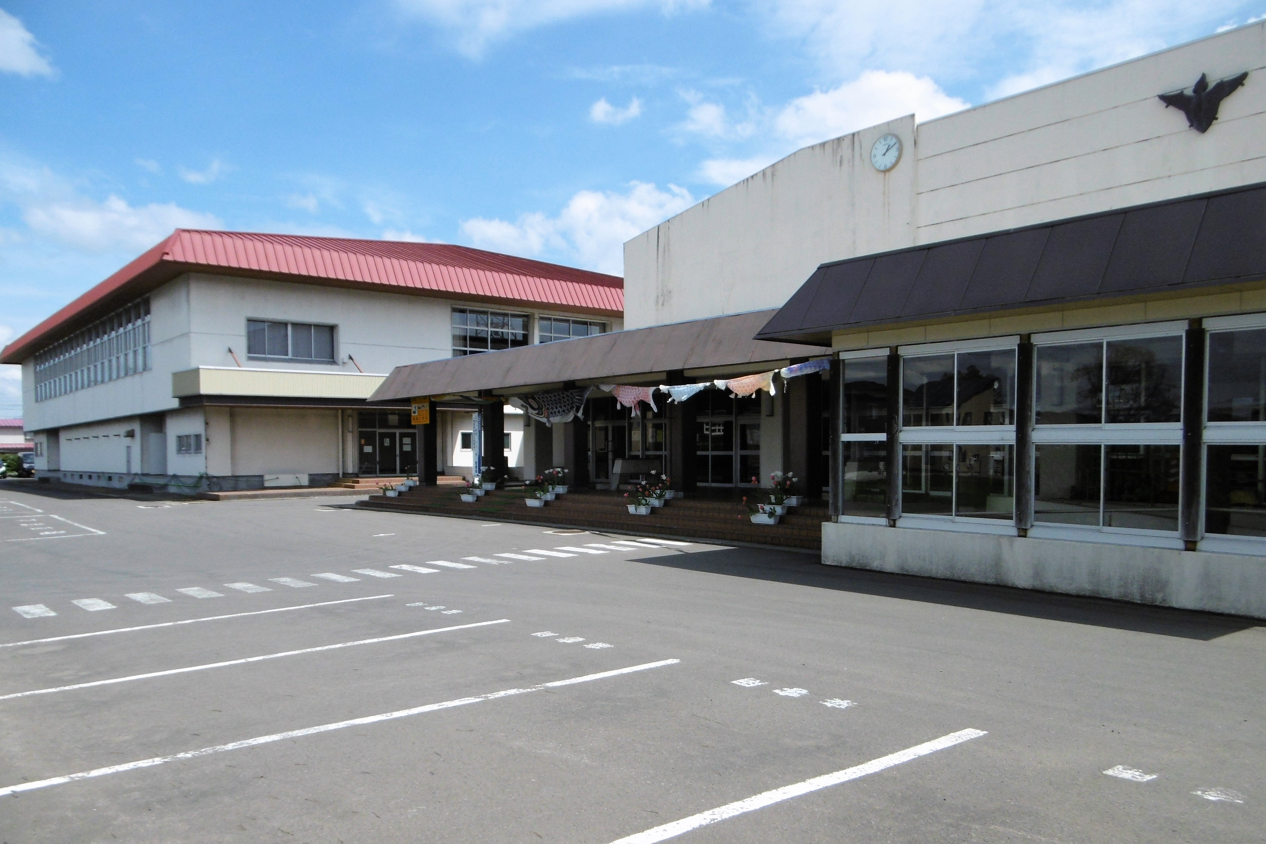 北秋田市立鷹巣小学校